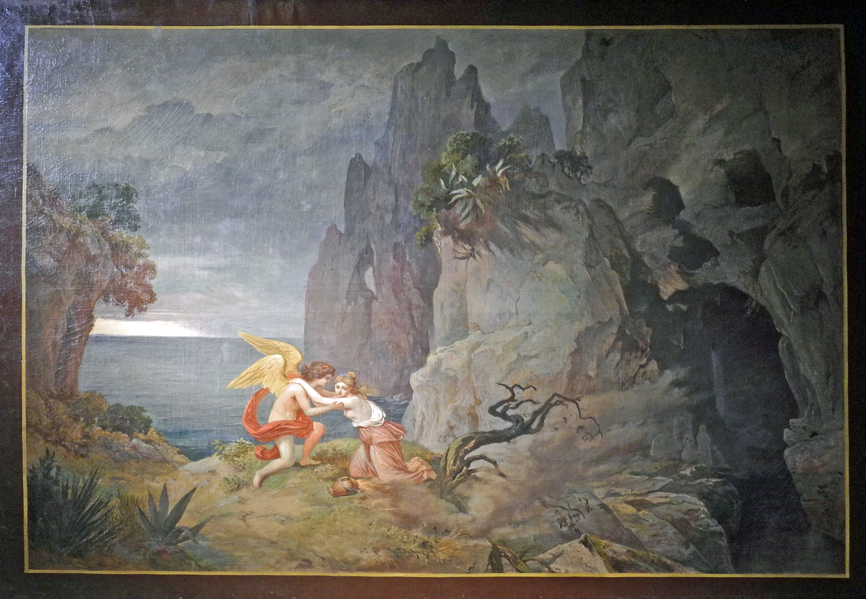 Bilderzyklus „Amor und Psyche“ von Adolf Thomas (1834–1887), Öl auf Leinwand (um 1873), jetzt im Städtischen Museum Zittau – Amor erblickt die schlafende Psyche